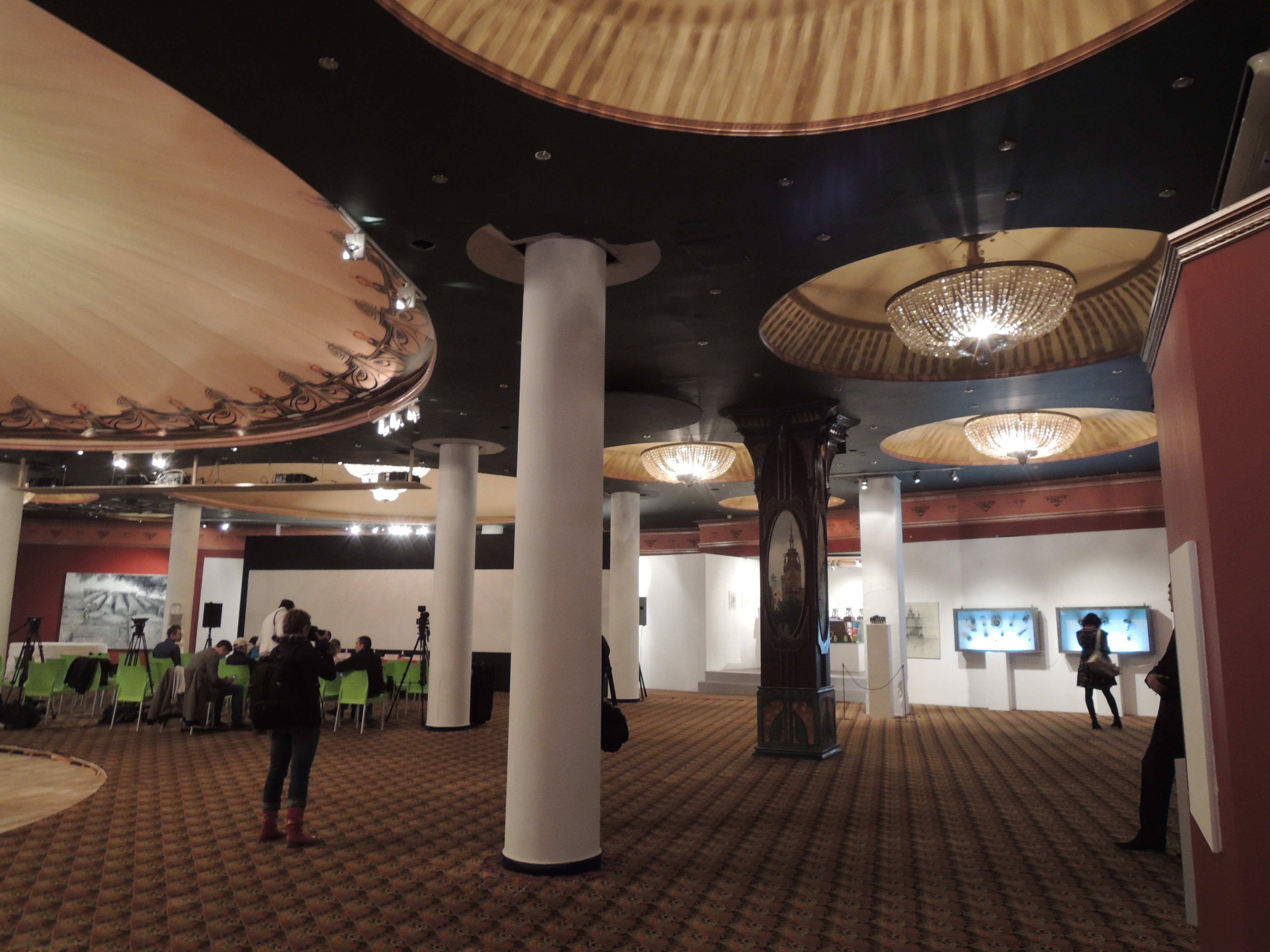 Кинотеатр "Ударник". 2012 год: сразу после того, как он стал собственностью фонда "Артхроника", которая начала производить реконструкцию интерьеров, в которых располагалось казино. Пресс-показ Премии Кандинского.